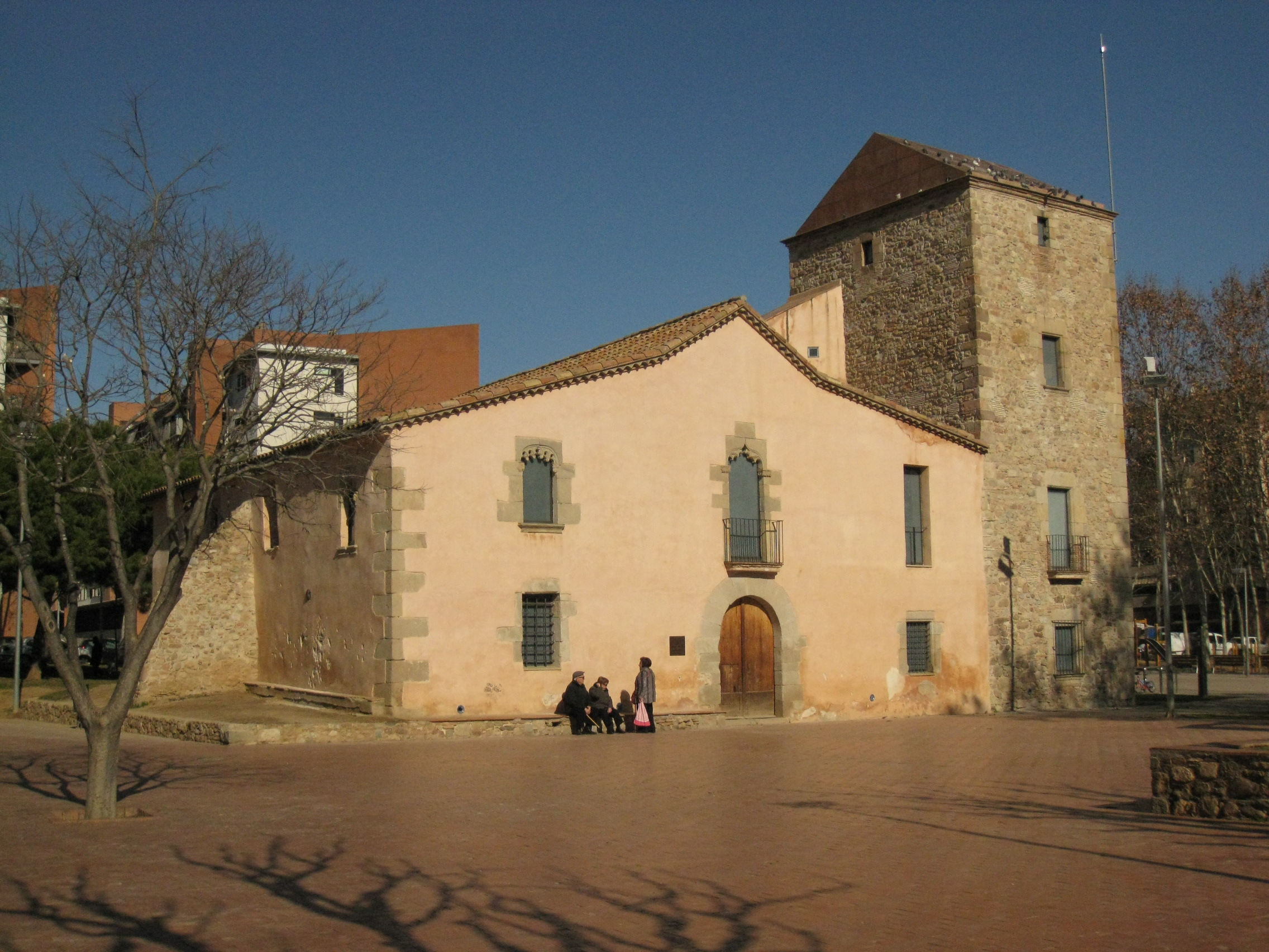 Can Borrell (Mollet del Vallès)